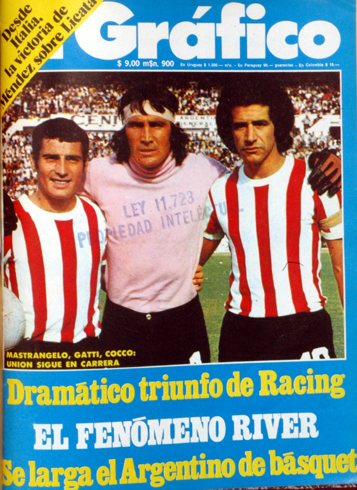 El Grafico del 26 de Marzo de 1975. Edicion 2894